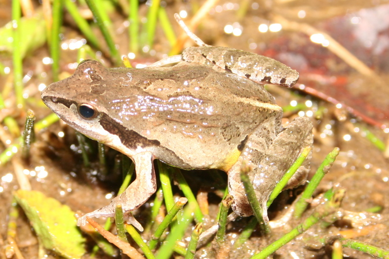 Physalaemus barrioi